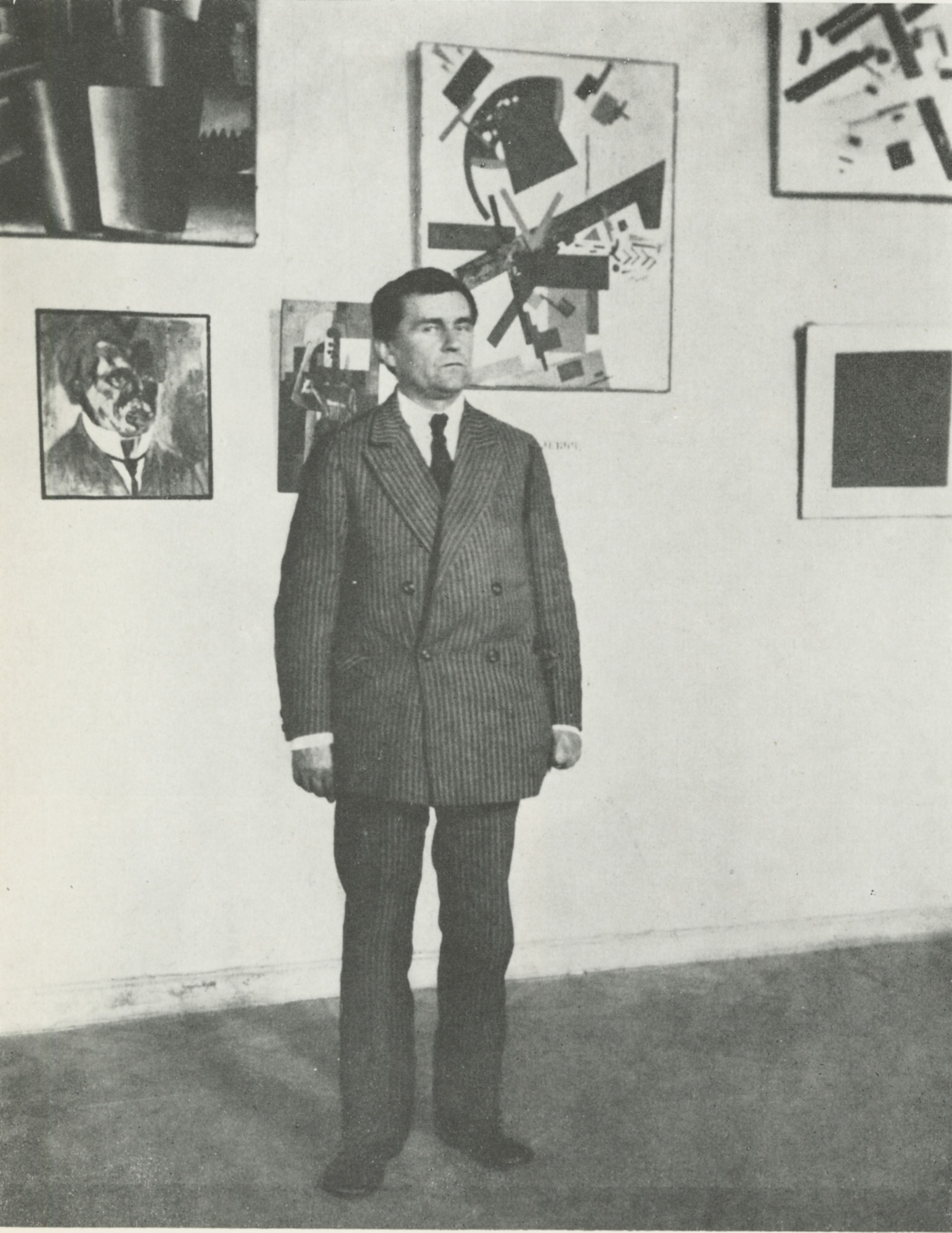 Malevich standing most probably in the Museum of Artistic Culture, Petrograd.